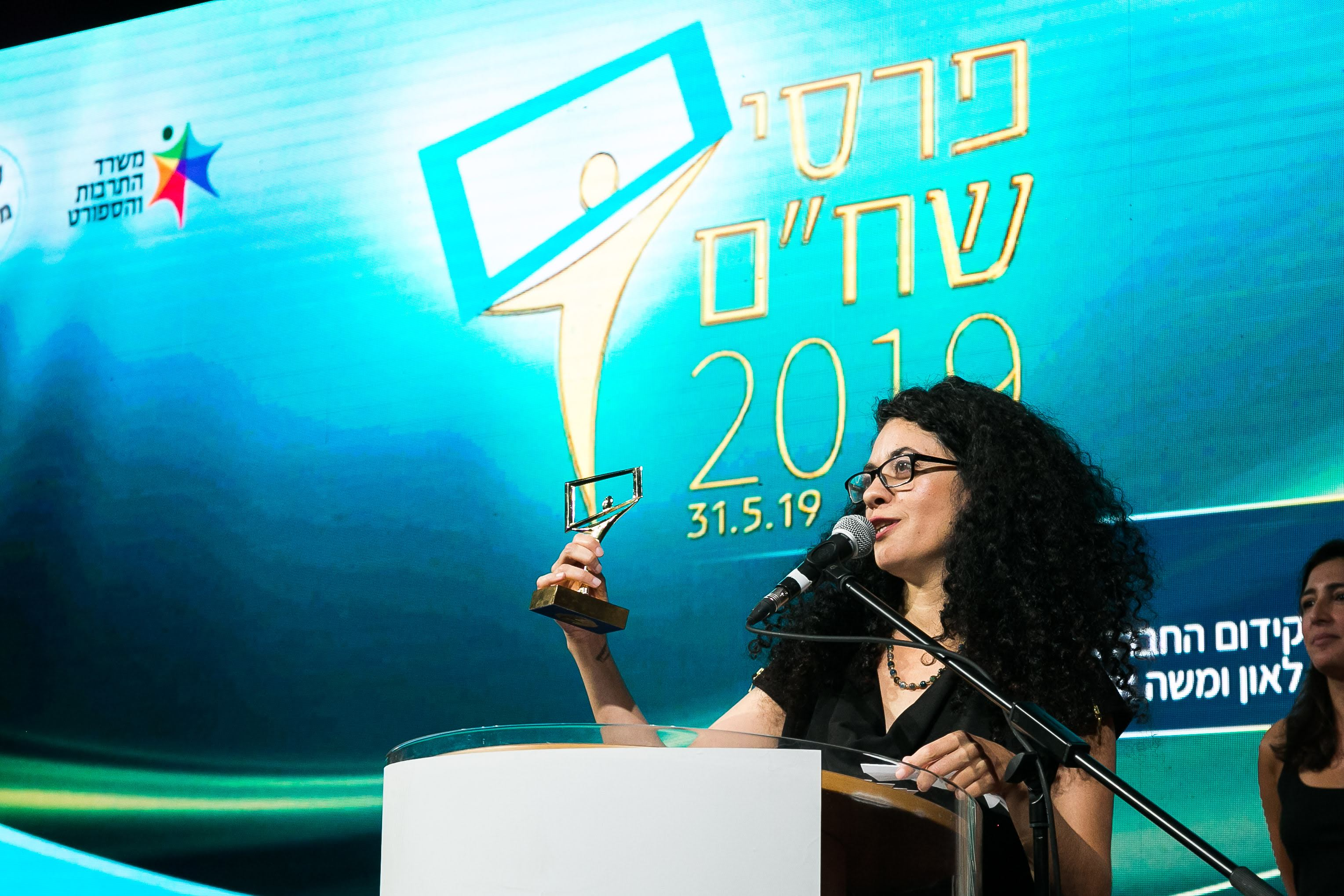 פנינה רינצלר מקבלת את פרס שח"ם על קידום החברה הישראלית באמצעות אומנות המשחק